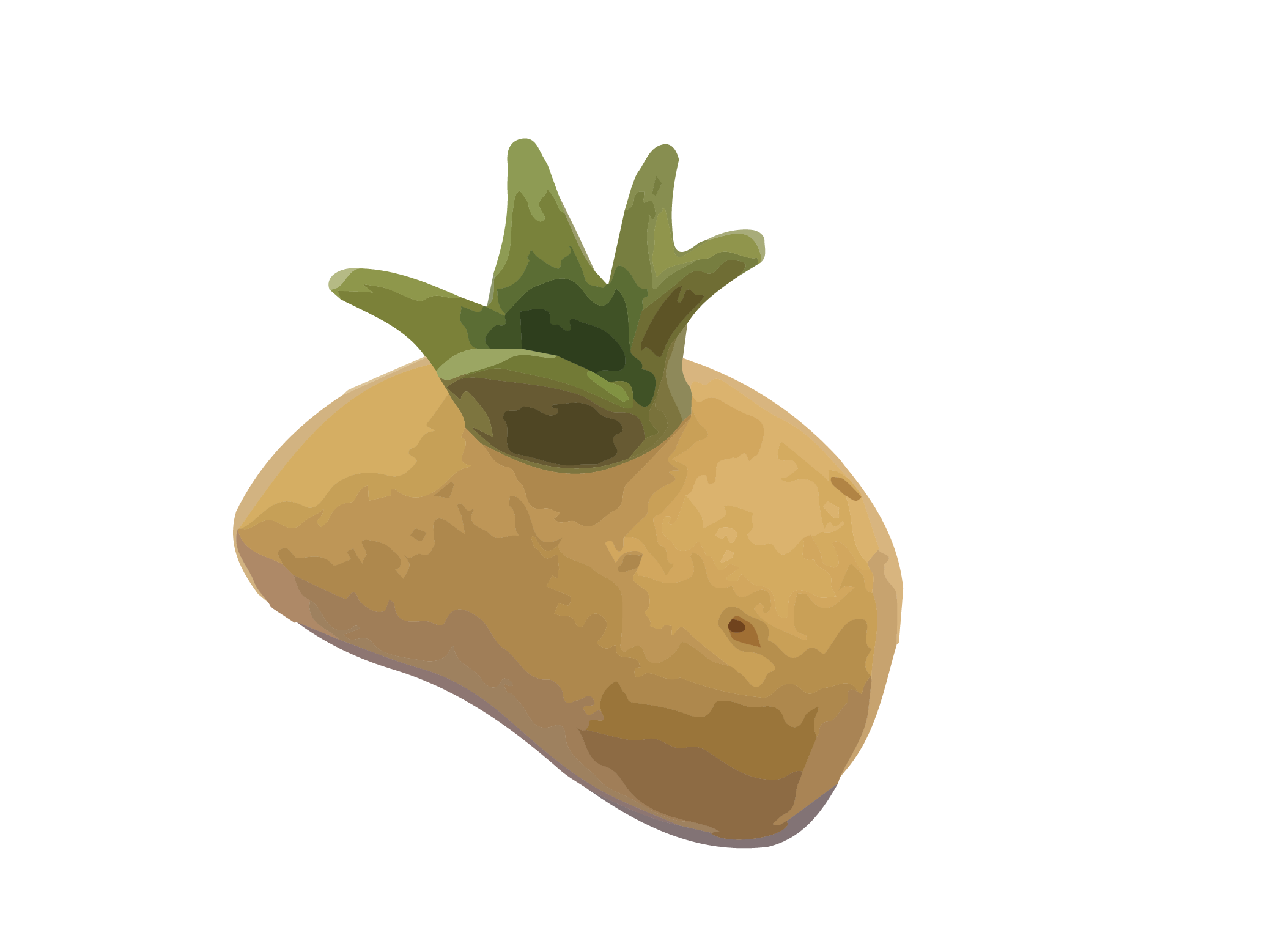 Under potatisfestivalen "De Vita Päron" i Nagu utdelas varje år priset Årets potatisknöl. Potatisknölen – en gyllene kronbeprydd potatis, gjord av Nina Wiiala-Laude. Den ges åt en Nagubo som gjort speciellt förtjänstfulla insatser för sin omgivning.